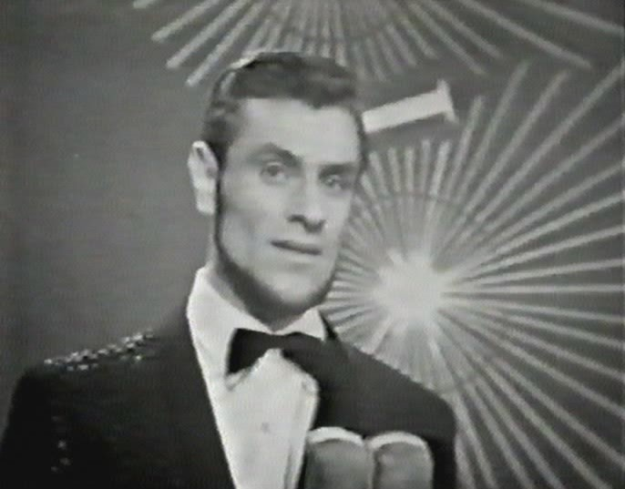 Eurovision Song Contest 1965 Regia di ROMOLO SIENA Allestimento scenografico di FRANCESCO DE MARTINO Luci di GUIDO CARACCIOLO Assistente alla regia ELENA AMICUCCI Assistente di studio MARCELLO SABETTI Capo stuadra tecnica ANGELO FONTANA Prima controllo camere GUSTAVO GALLARATO Capo tecnico audio CIRO PALLONETTO Cameramen ADOLFO BOTTA, SERGIO FREISSENET, ENRICO LANDINI, FLORIDO VARZI ________________________________ Viktor Klimenko